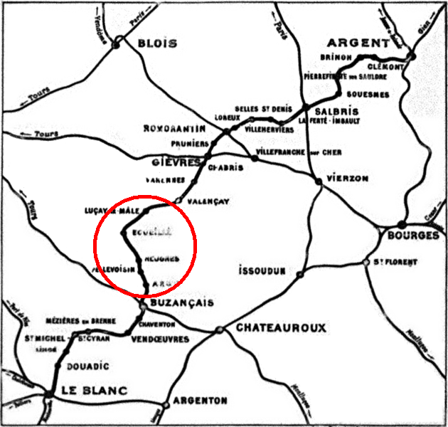 Einfache Karte der Bahnstrecke Blanc-Argent (mit Markierung Train du Bas-Berry)